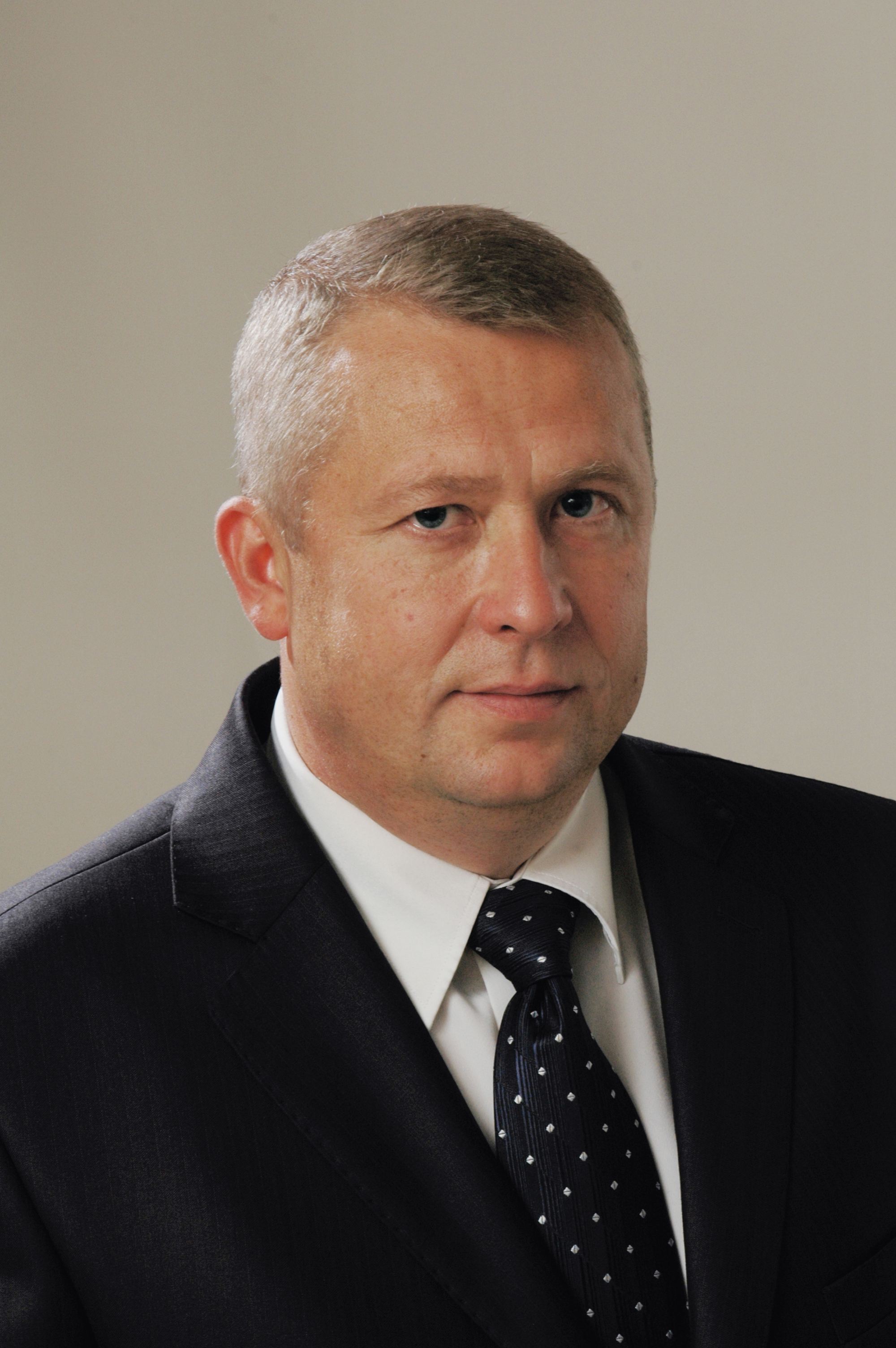 Foto: Saeima